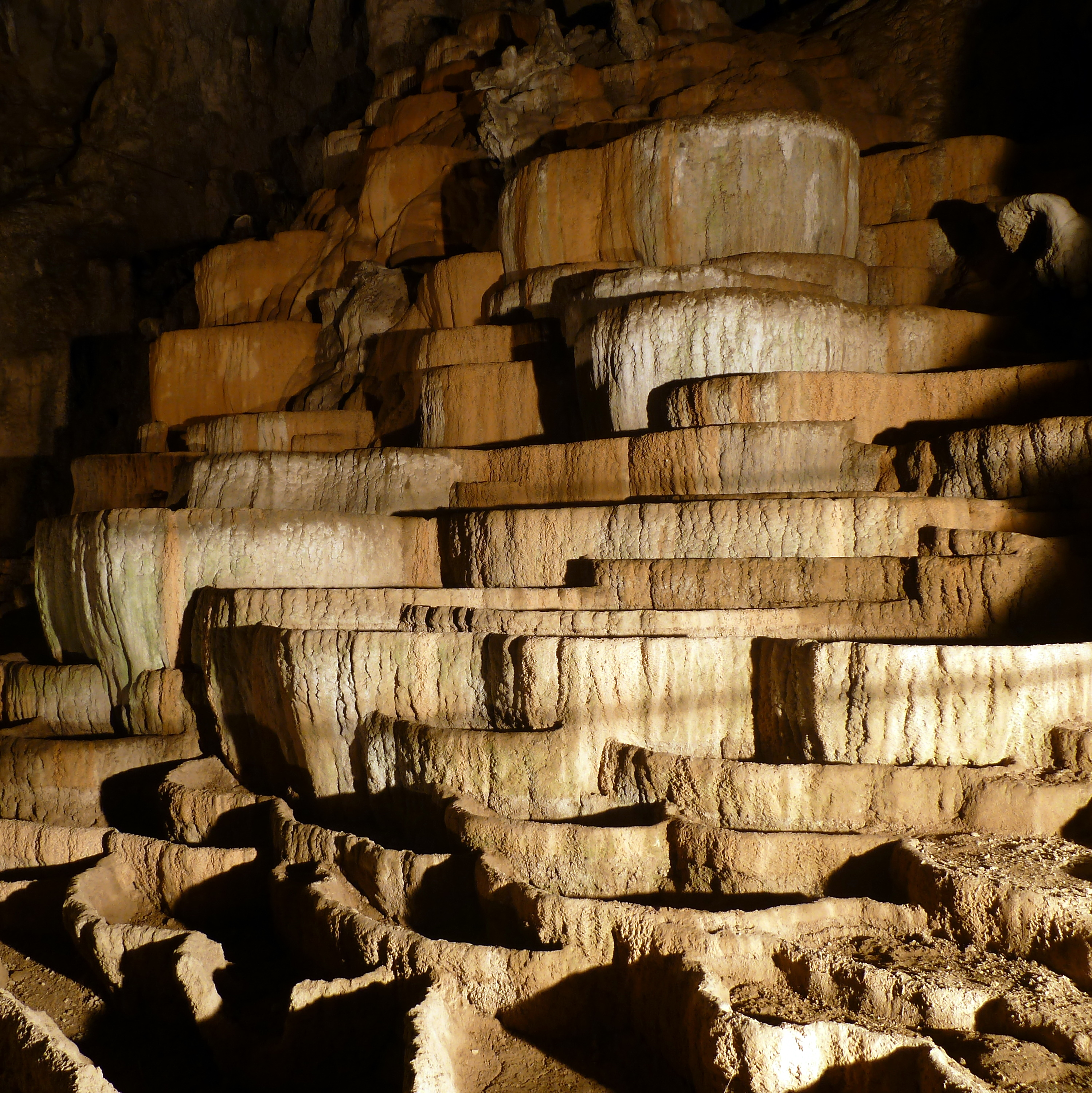 Škocjan caves, Divaca, Словения